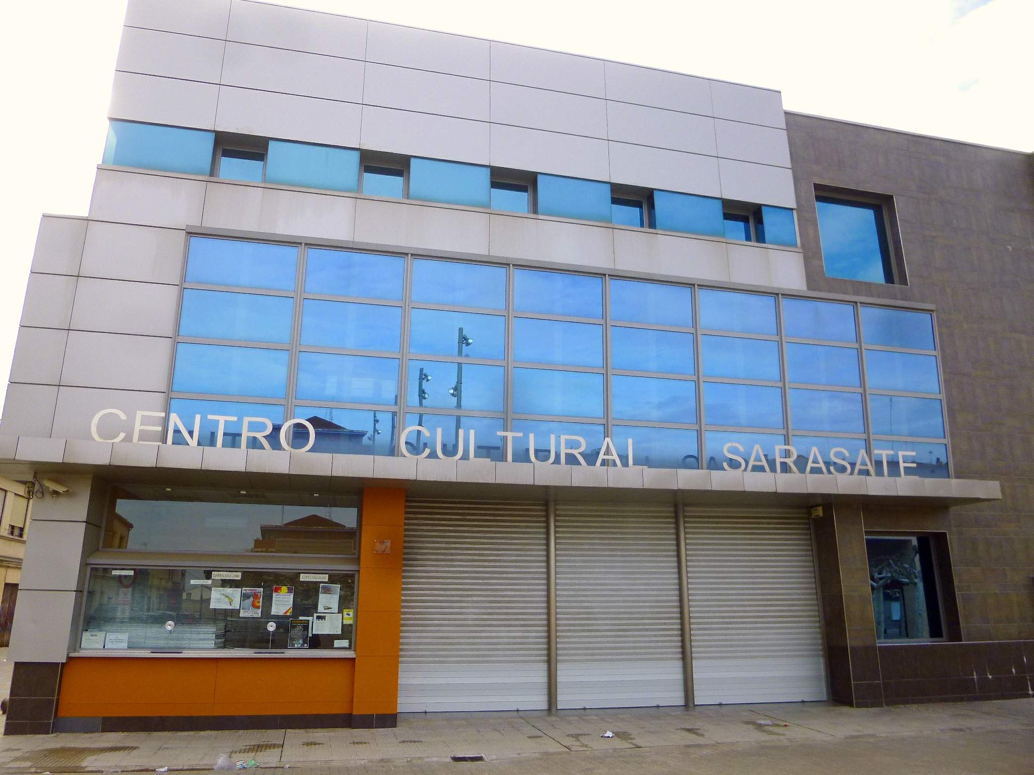 Centro Cultural Sarasate (Castejón, Navarra)